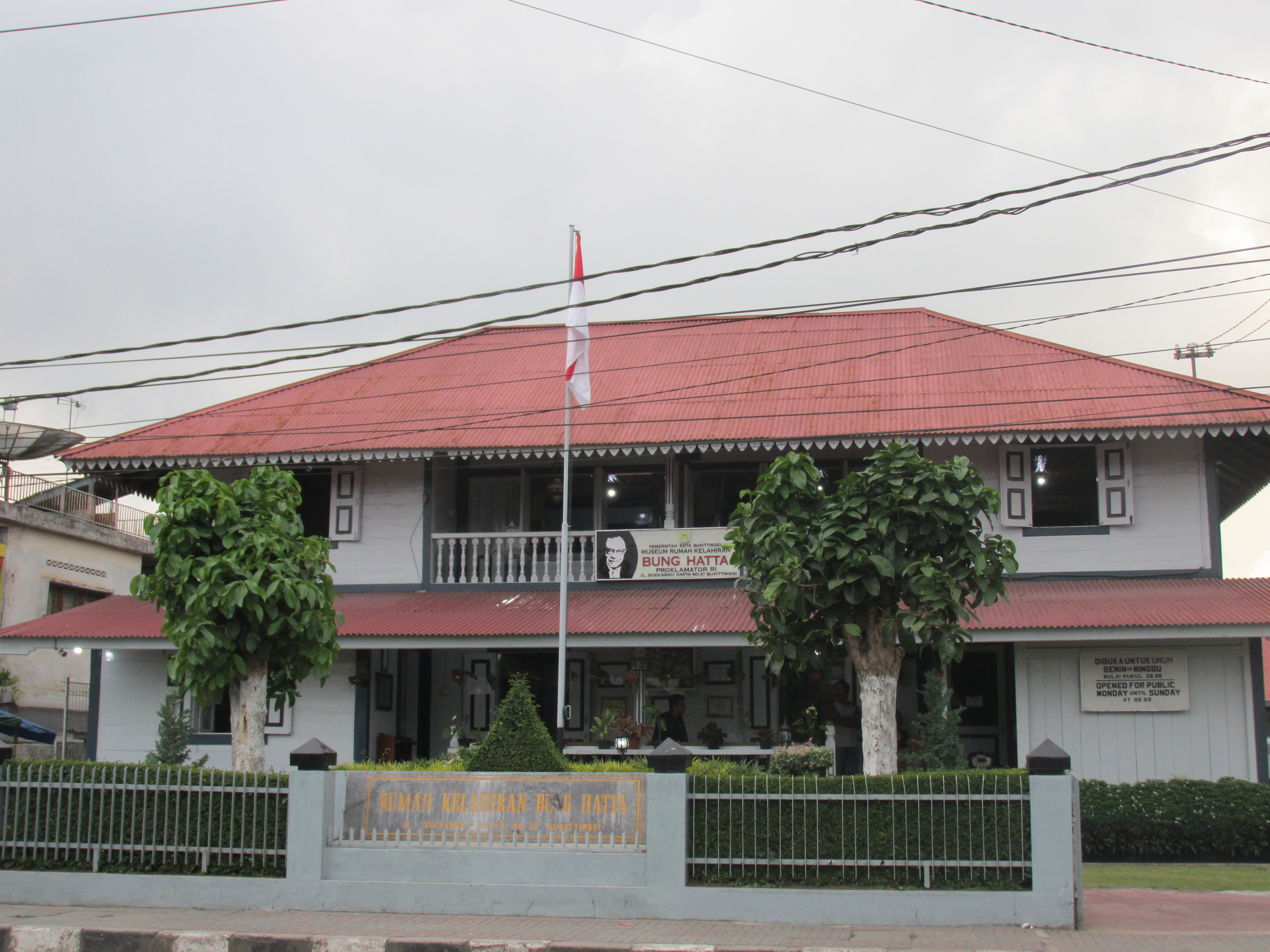 Rumah kelahiran Bung Hatta tampak lengang